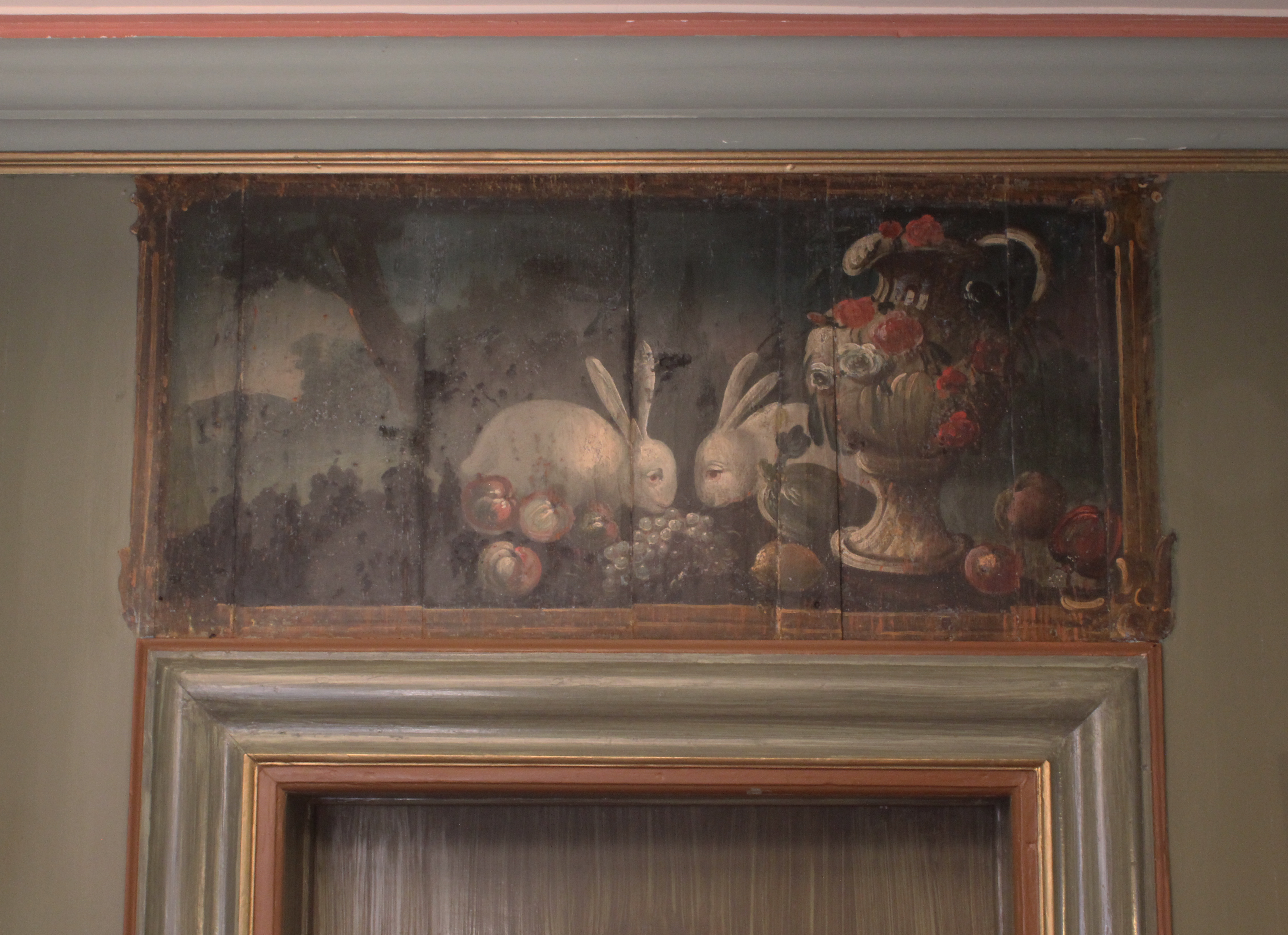 Gjesvål gård, Orkdal. Supraporta fra slutten av 1700-tallet, muligens malt av Johan Carl Cristian Micaelsen.